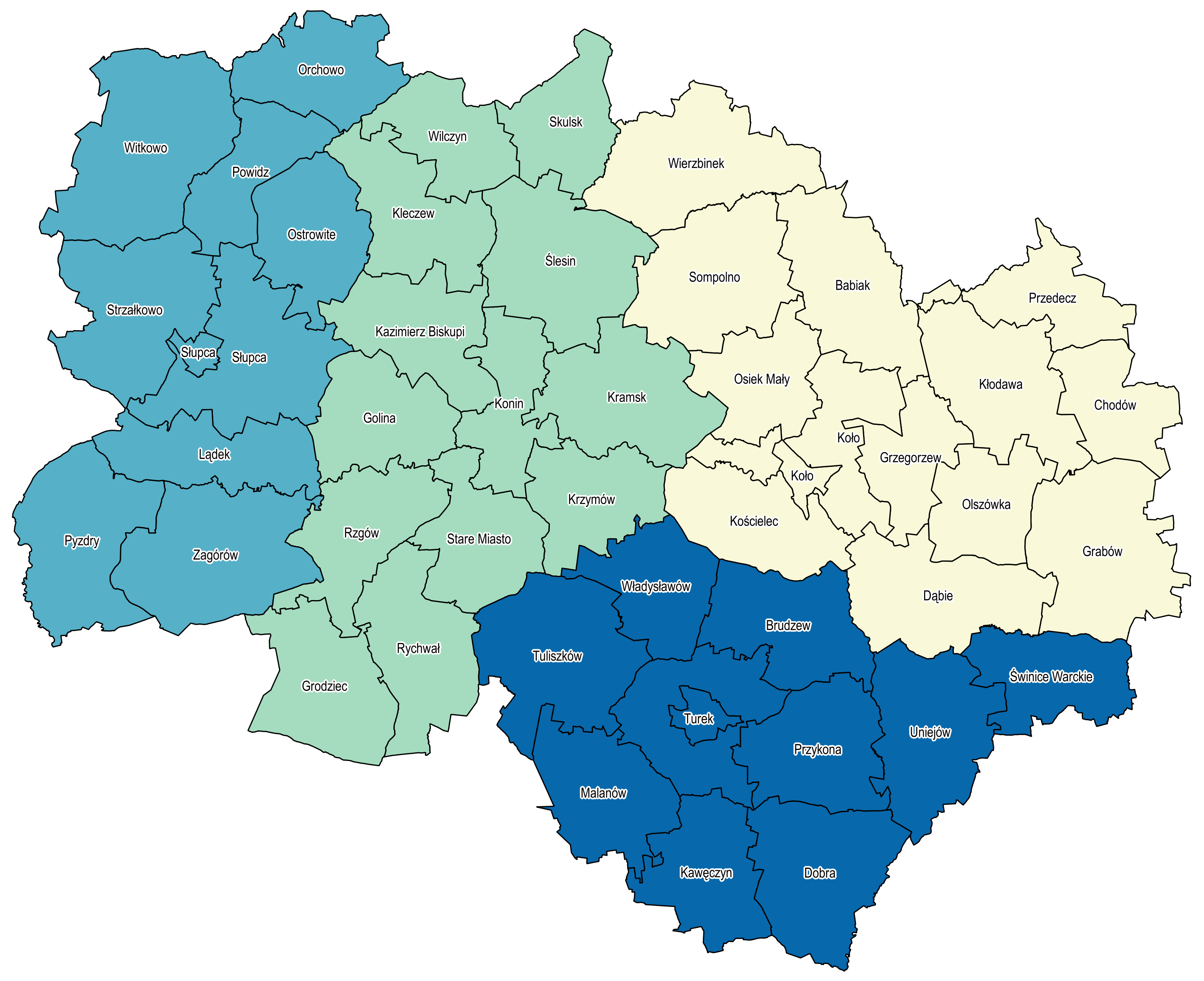 Obszar Urzędów Rejonowych w województwie konińskim w latach 1990-1998